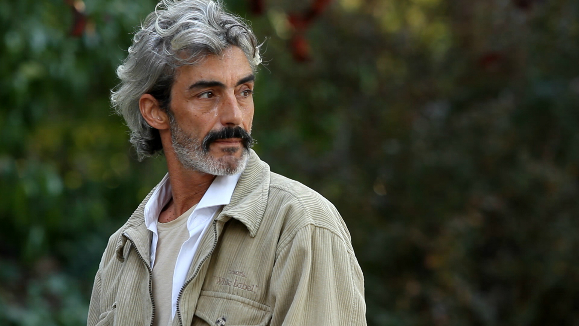 Micky Molina